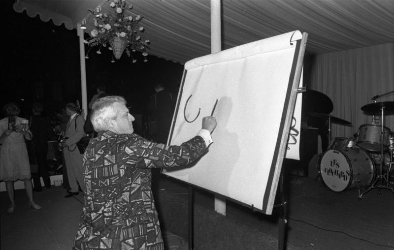 Sommerfest des Bundeskanzlers im Park des Palais Schaumburg